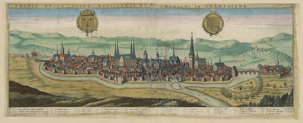 vue ancienne de Châlons.